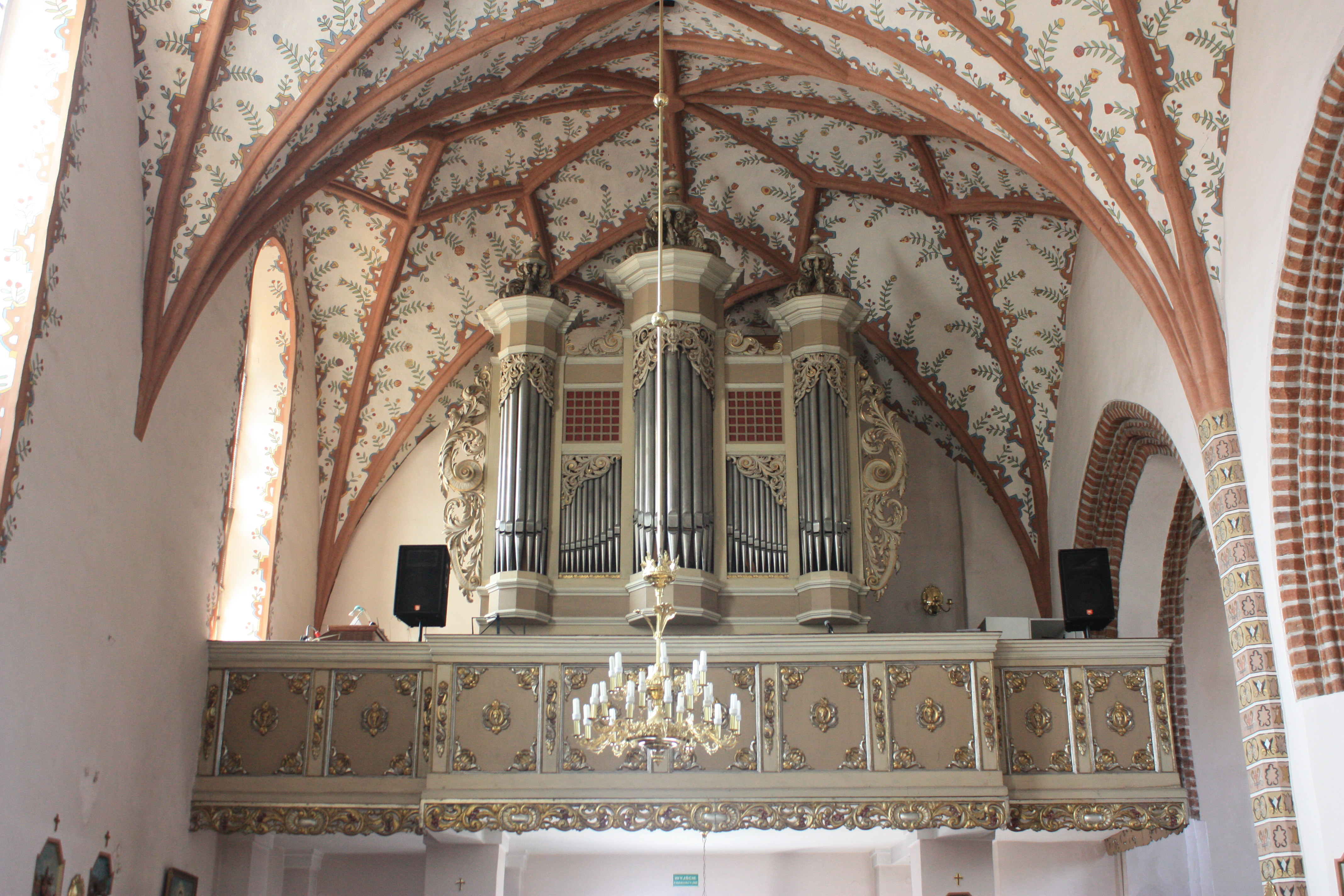 Kościół Narodzenia NMP w Kaźmierzu. Chór i organy.